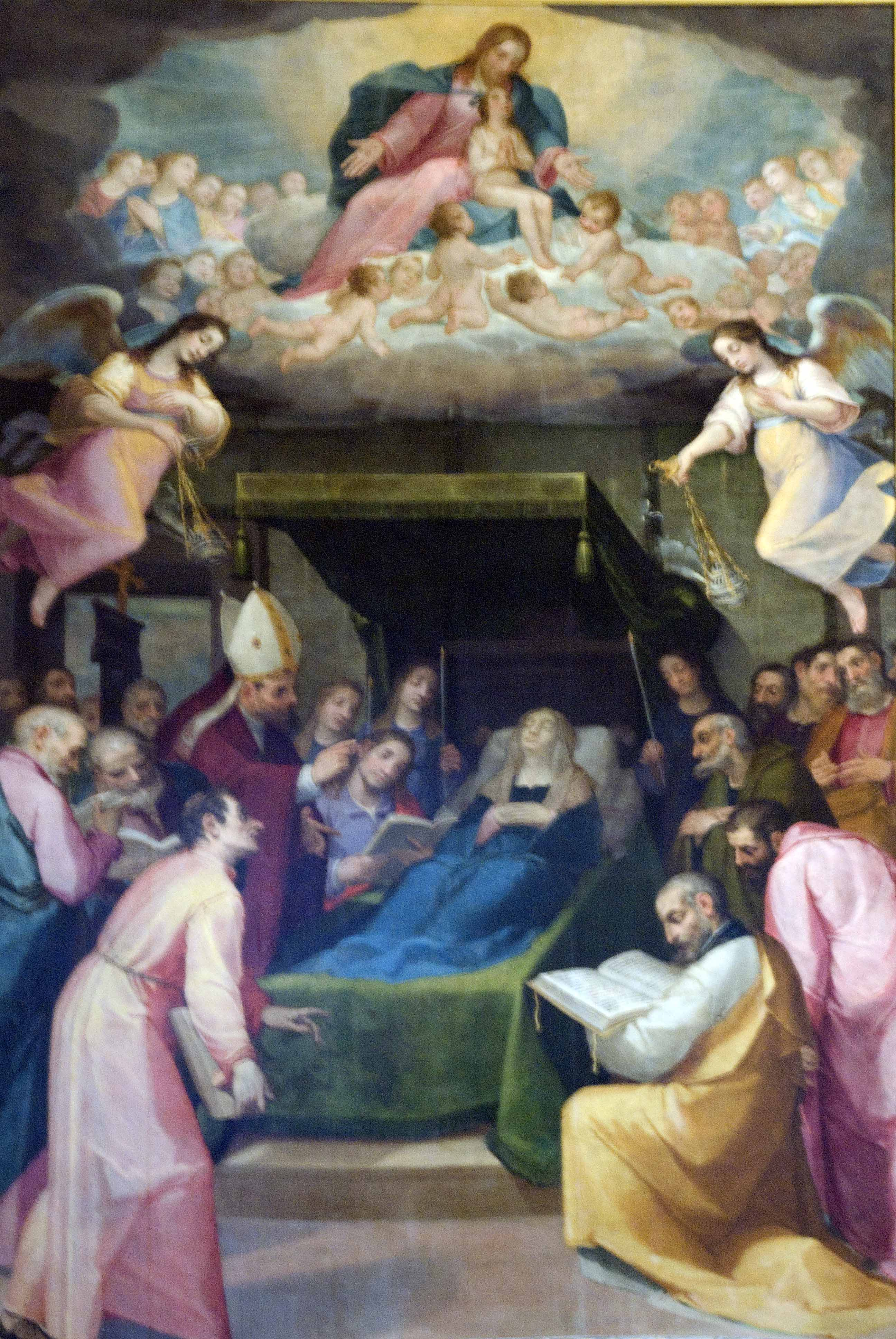 Dormitio Virginis (Transito della Beata vergine Maria ), olio su tela di Alessandro Casolani (Collegiata di Radicondoli)